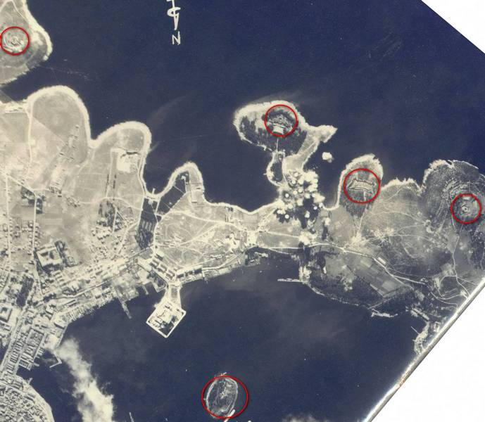 bombing pula 1945